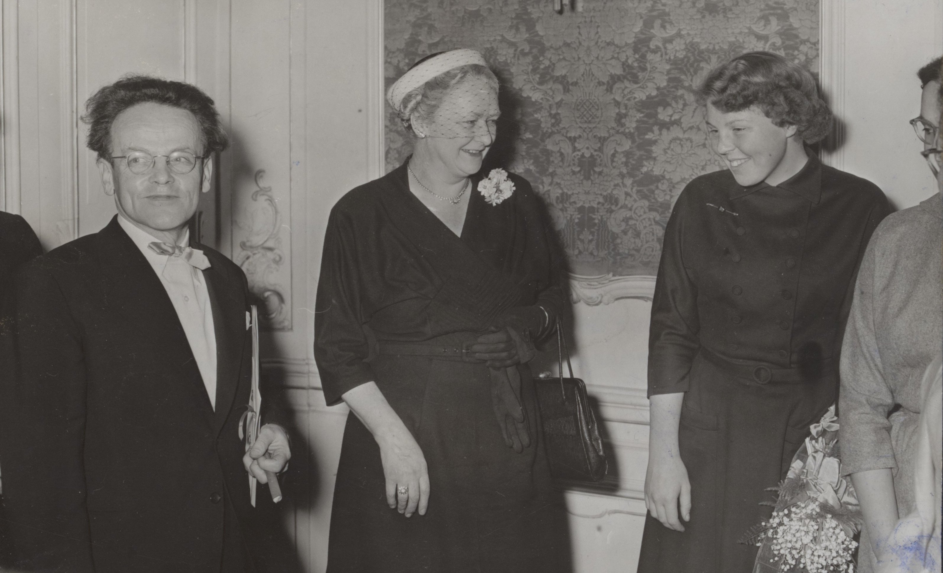 Uitreiking Martinus Nijhoffprijs, 26 januari 1955, aan Aleida G. Schot voor haar vertalingen van Poesjkin, Toergenjev, Lermontov, Gogol, Tsjechov e.a.; aan Bertus van Lier voor zijn vertaling van ‘Antigone’ van Sofokles. Den Haag (Nederland)